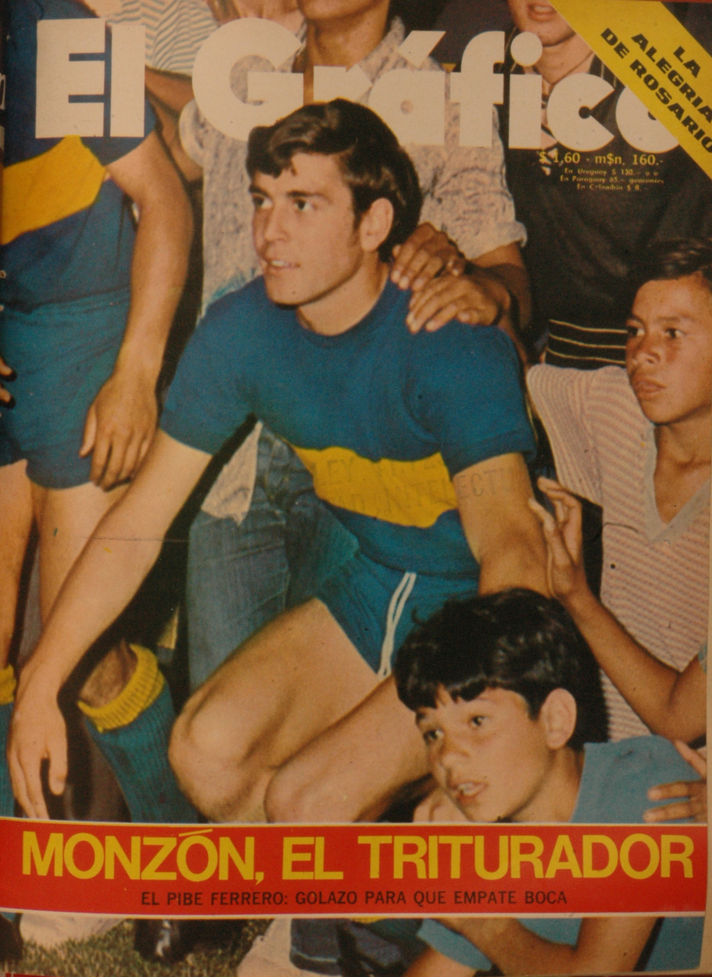 El Grafico del 07 de Diciembre de 1971. Edicion 2722